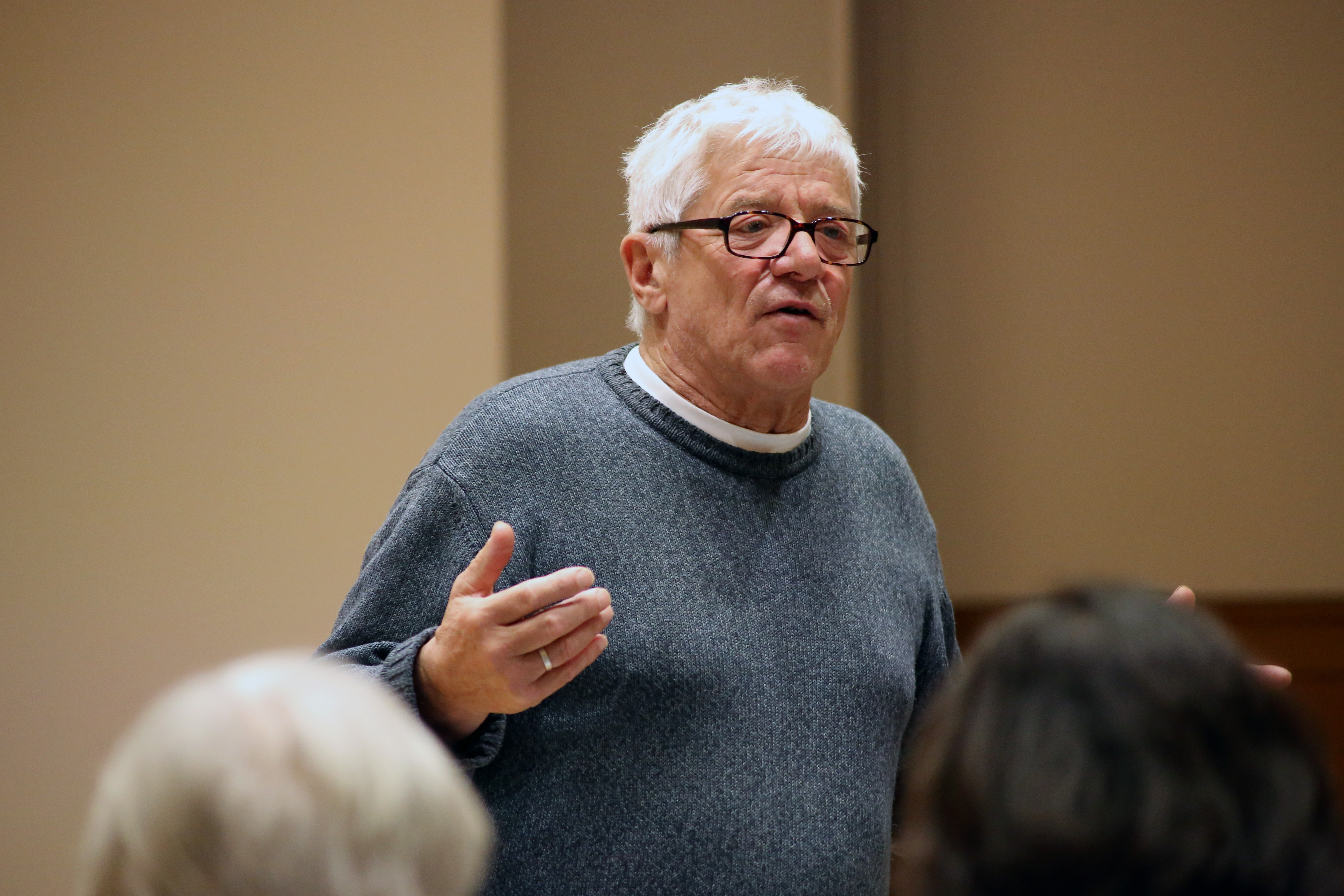 Landolf Scherzer in der Stadtbibliothek Nordhausen